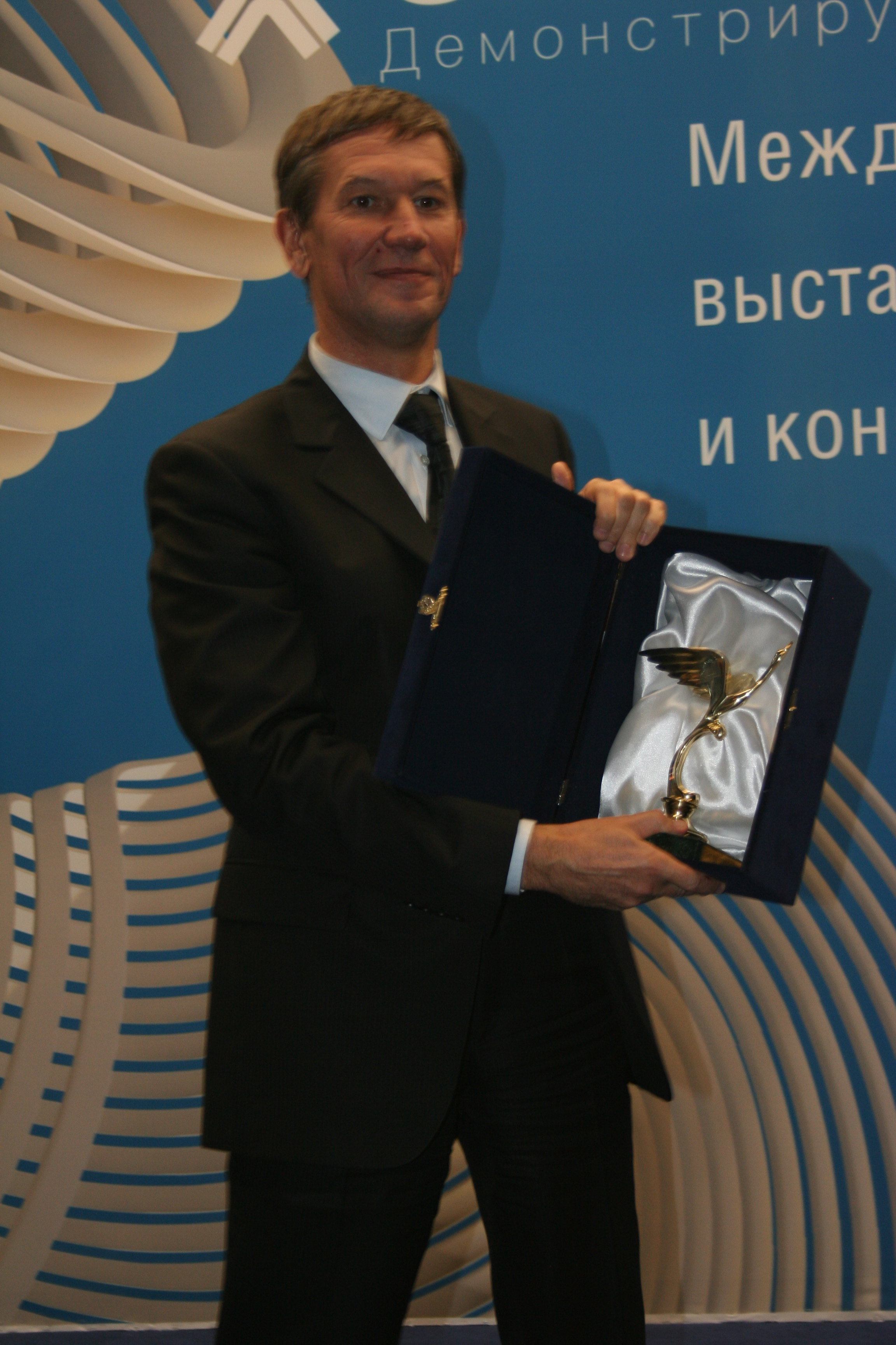 Генеральный директор Котельников О.И. Получение Гран-При на дегустационном конкурсе Продэкспо-2016